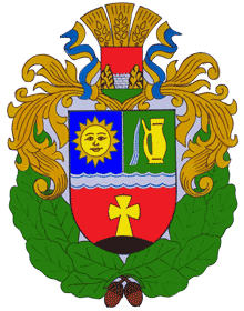 Герб Городоцького району